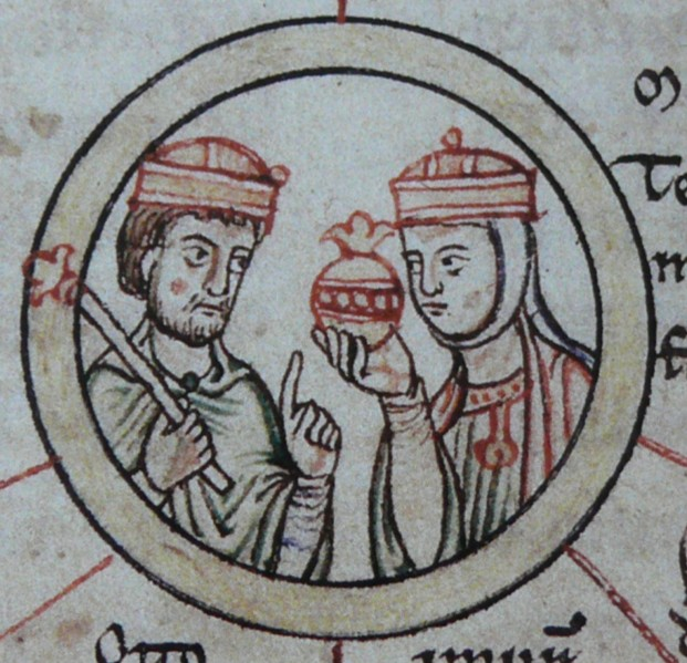 Jindřich Ptáčník a Matylda z Ringelheimu